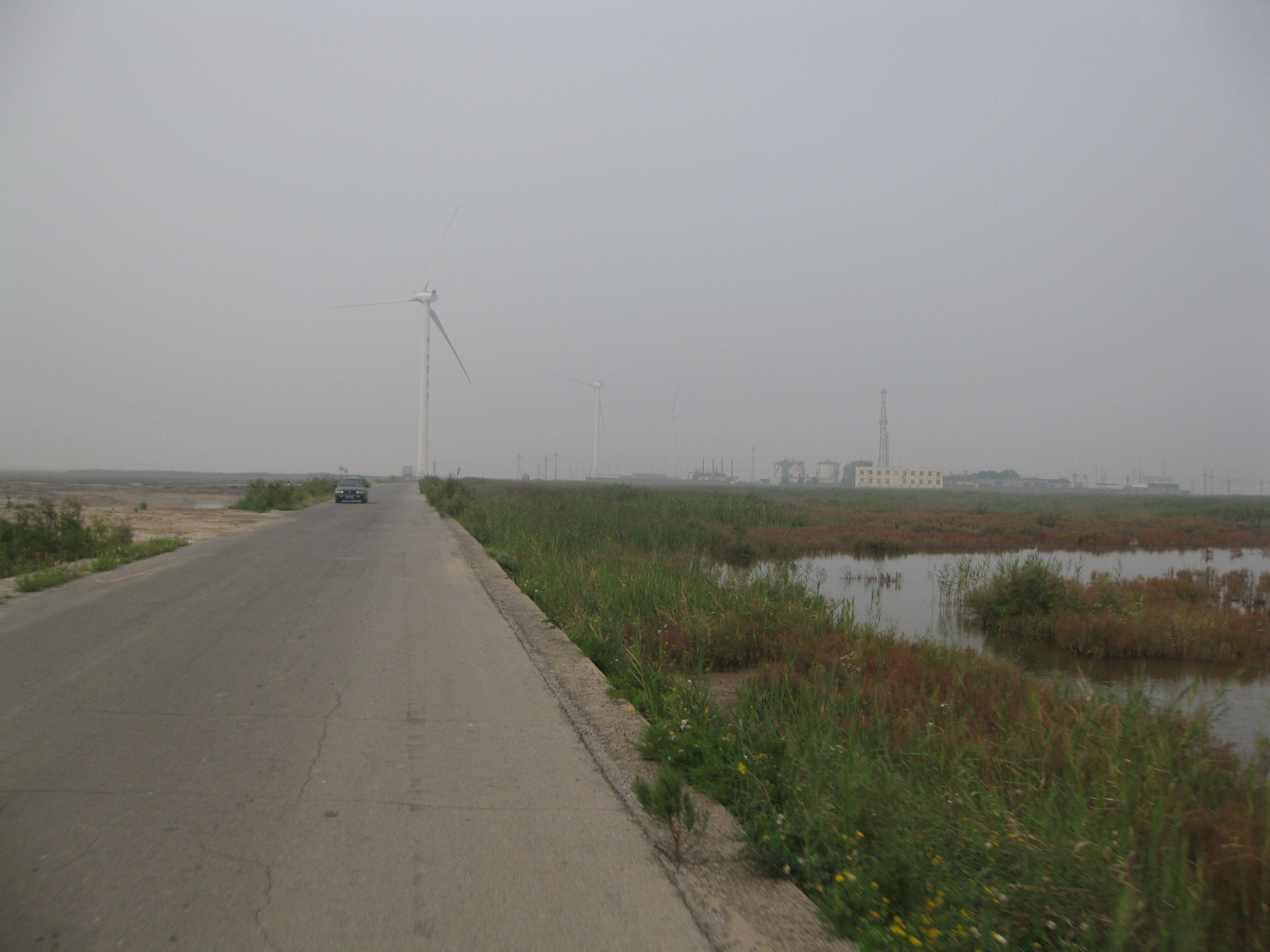 华能利津风电厂 - Huaneng Lijin Wind Farm - 2012.08